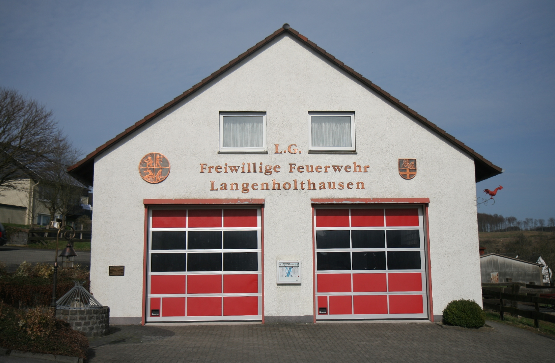 Gebäude der Freiwilligen Feuerwehr in Balve-Langenholthausen, Bornstraße.